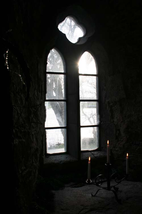 Utstein Kloster, Klosterküche